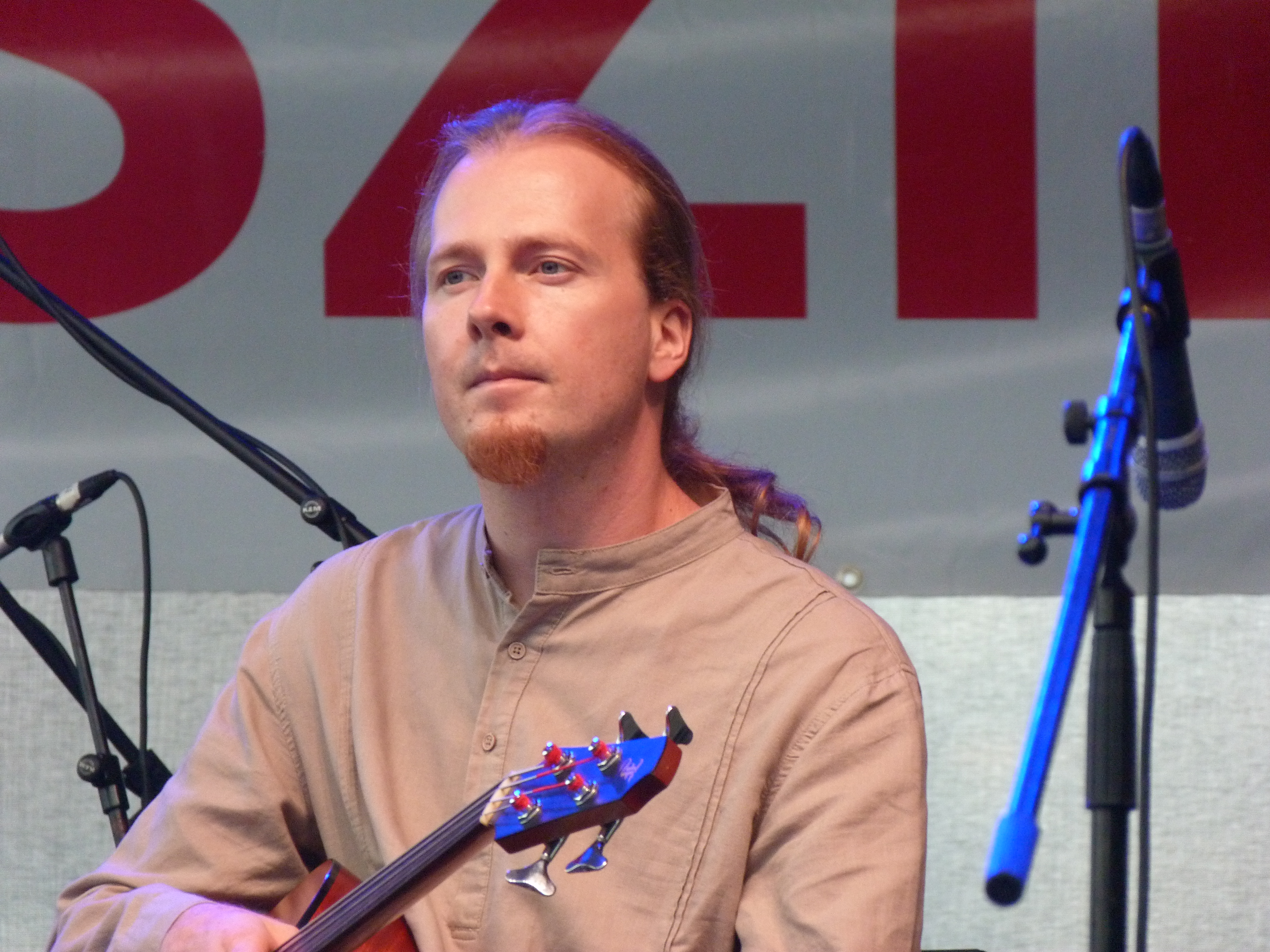 A felvétel 2014. szeptember 12-én, pénteken készült Budapesten, a 23. Budavári Borfesztiválon. Nagyszínpad, a Makám együttes és vendégei. Az együttes tagjai: Krulik Zoltán - gitár Korzenszky Klára - ének Kuczera Barbara – hegedű, vokál Boros Attila - basszusgitár Eredics Dávid - fúvós hangszerek Keönch László - ütőhangszerek Mohai György - hangmérnök ( Szalóki Ágnes, Lovász Irén. Bognár Szilvia: Katona sirató KATONA SIRATÓ MAKÁM BOGNÁR SZILVIA MIHI 2014 Források Bor és Pia borpiaci szakmai magazin 2014. augusztus Borfesztivál Melléklet 23. Budavári Borfesztivál kiállítási tájékoztató ©© Derzsi Elekes Andor, Budapest, 2014, A kép és filmfelvételek egészben, vagy részletekben másolását, bármilyen úton történő sokszorosítását és felhasználását a szerző ellenérték nélkül, jogutódjaira is kihatóan megengedi. Az engedély kiterjed a kereskedelmi célú hasznosításra is. Kéri azonban nevének feltüntetését a felhasználás során. A Metapolisz sorozat valamennyi képe és filmje Creative Commons alatti valamint kereskedelmi - for profit - célra is felhasználható. Ajánlott hivatkozás: Derzsi Elekes Andor: Metapolisz DVD line